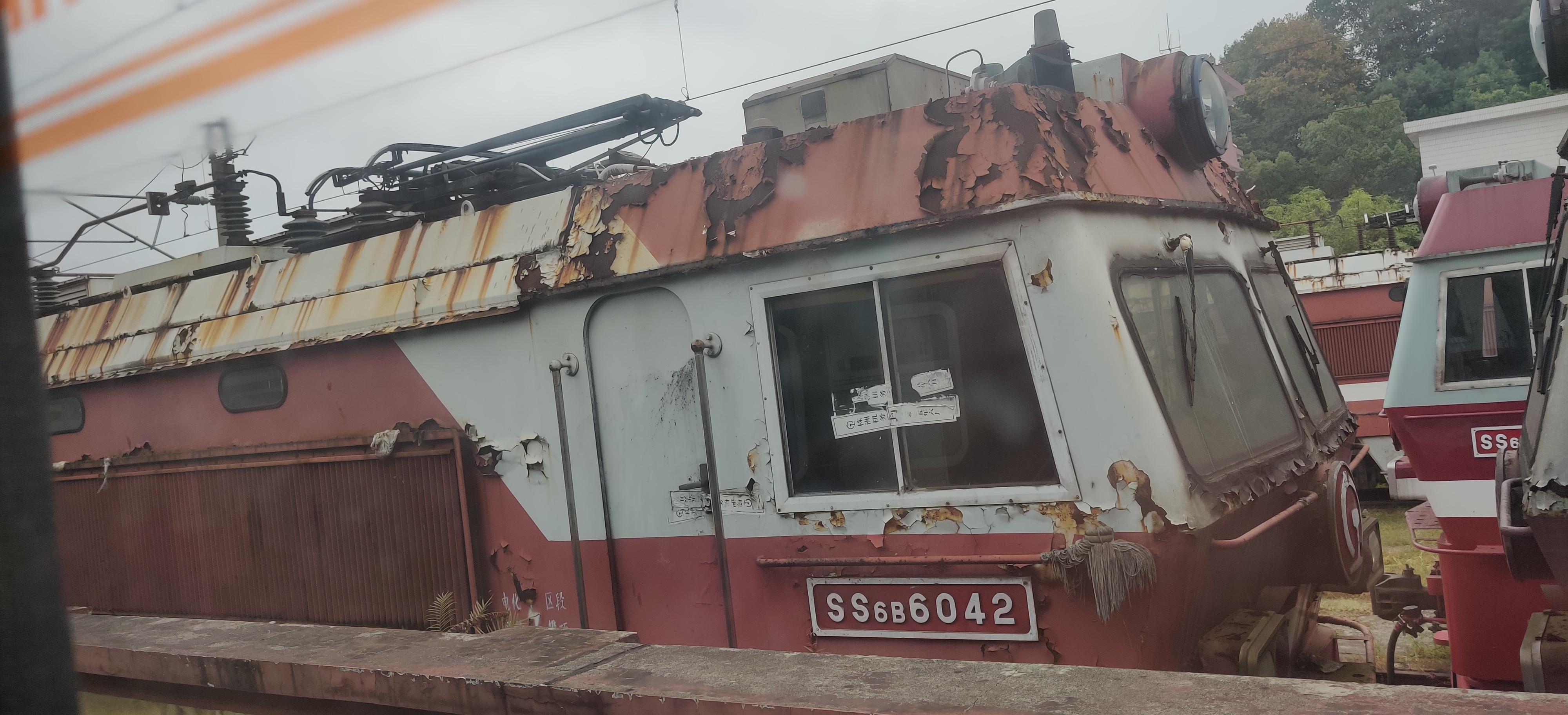 中文（中国大陆）: 已报废的韶山6B型电力机车